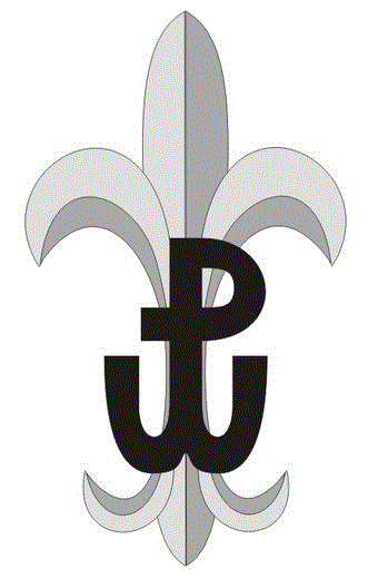 Szare Szeregi